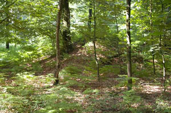 Rest einer Motte an der Bahnlinie Hilden-Opladen, gab über Jahrhunderte Anlass zu der Vermutung, hier habe das versunkene Schloss gestanden.